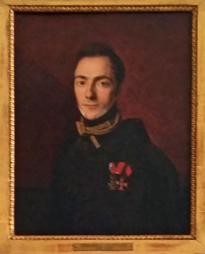 Gerog Graf Apponyi um 1827, Gemälde von Ferdinand Georg Waldmüller